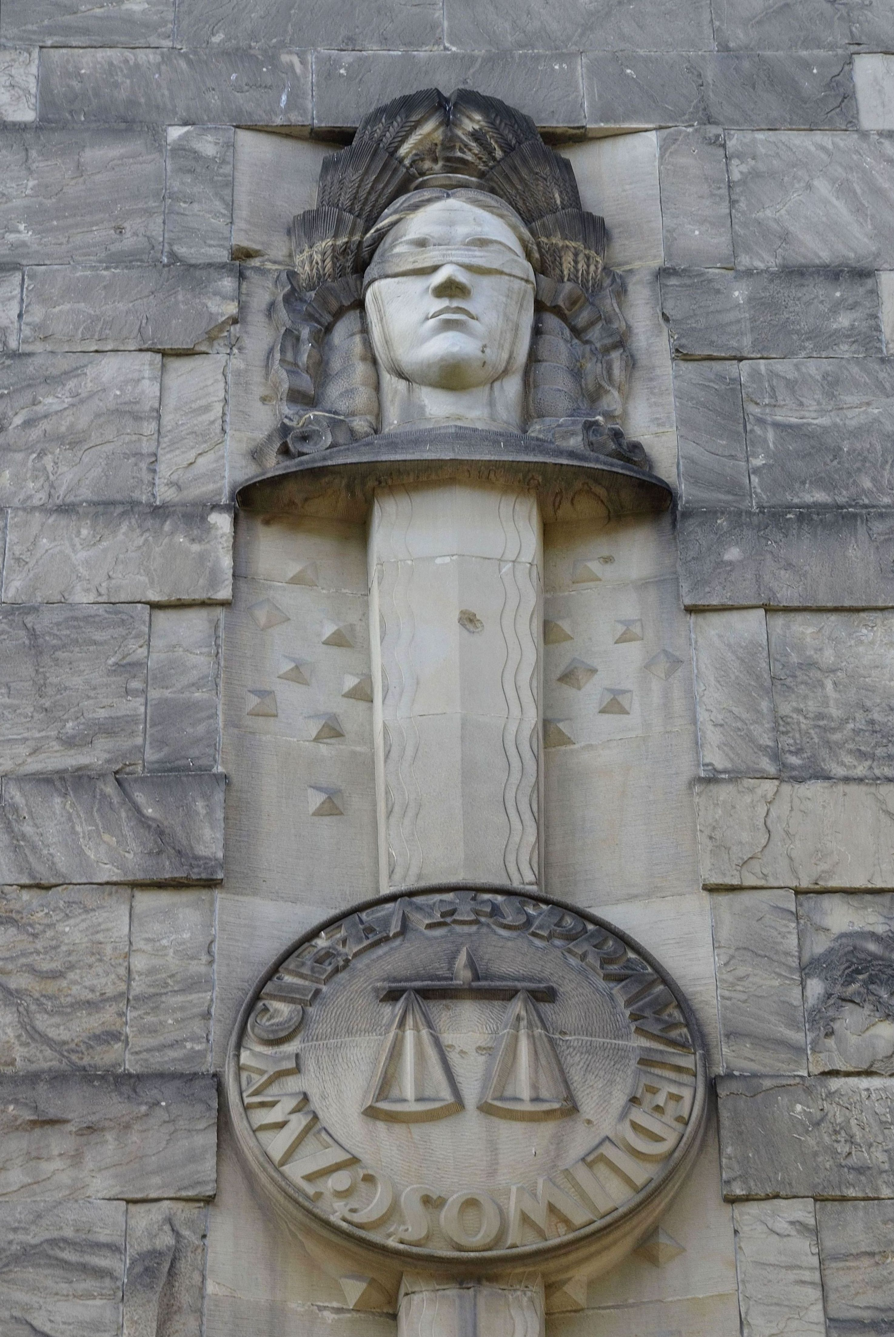 Płaskorzeźba Temidy na elewacji gmachu Sądu Okręgowego w Warszawie (tzw. Sądy na Lesznie - dziedziniec wewnętrzny)